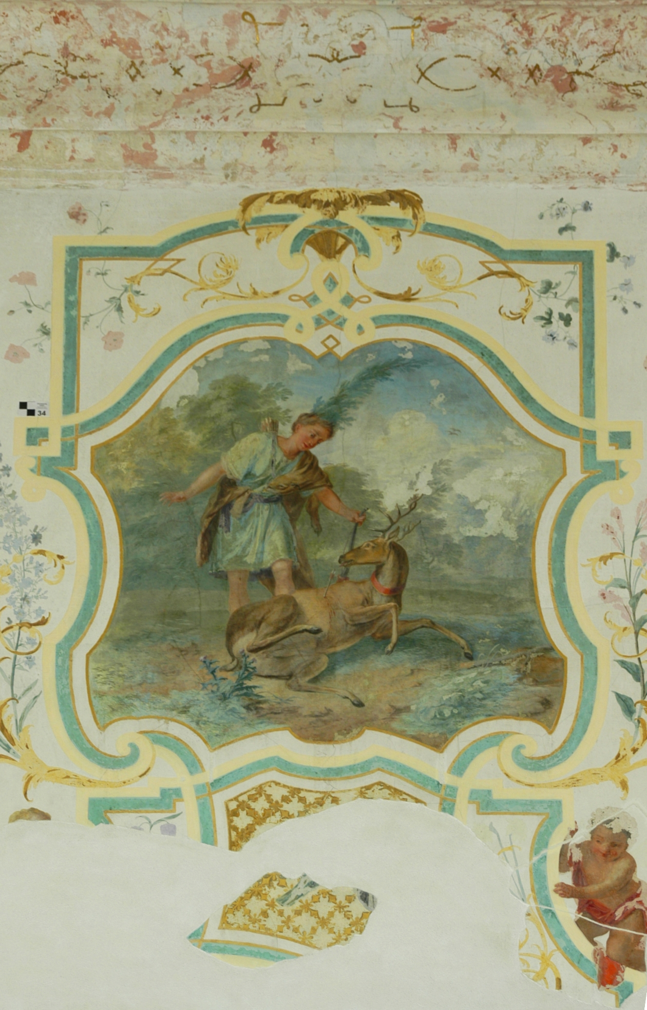 Göllersdorf - Schloss Schönborn, Fresko in der Orangerie Dieses Bild wurde anlässlich des österreichischen Tags des Denkmals 2012 in Niederösterreich eingereicht.